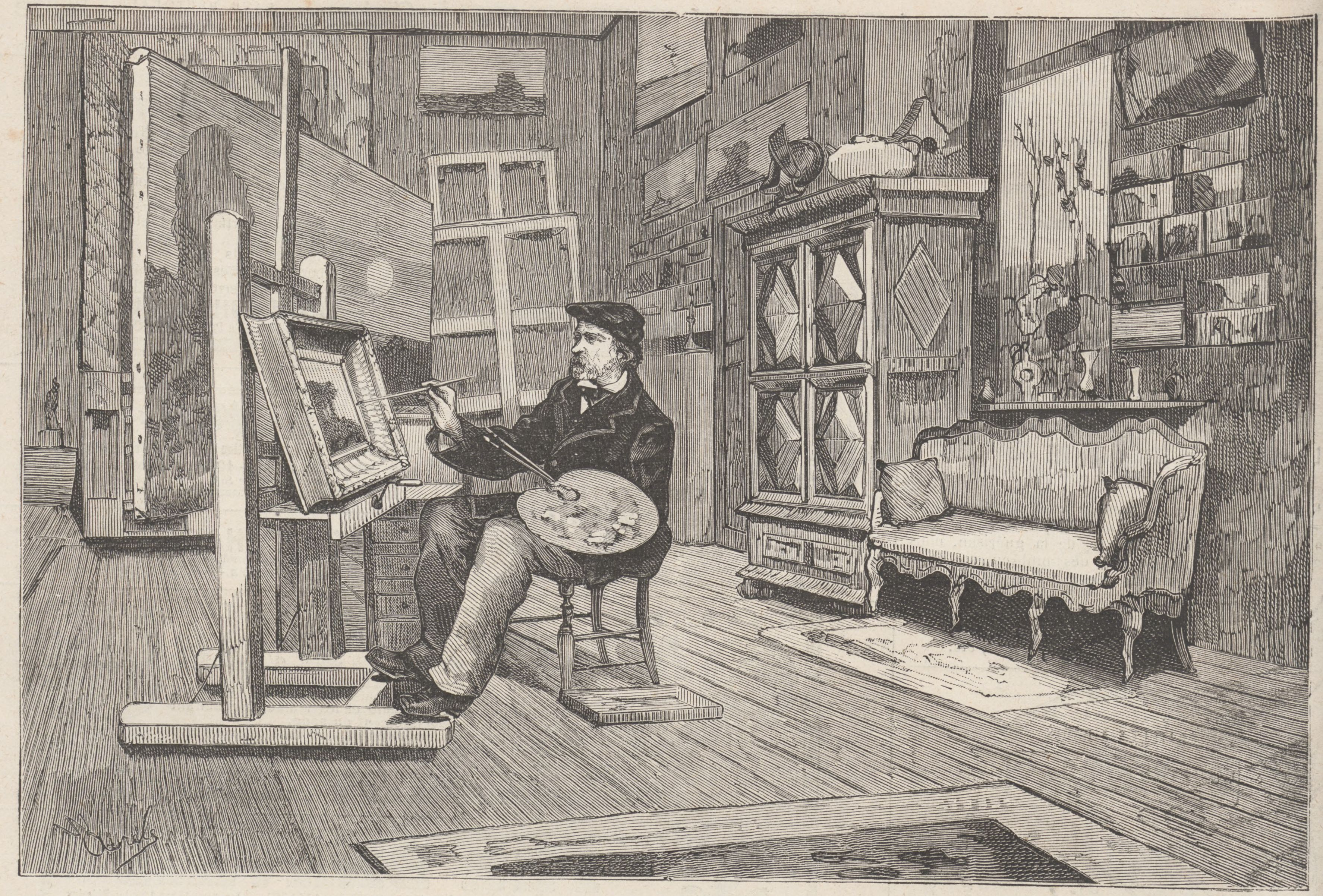 Vue de l'atelier du peintre Charles-François Daubigny, gravure sur bois parue dans Le Monde Illustré, n°1092, 3 mars 1878, p. 160.